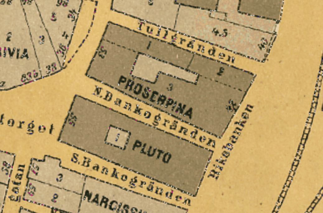 Del av Stockholmskarta visande Kvarteren Pluto och Proserpina i Gamla stan